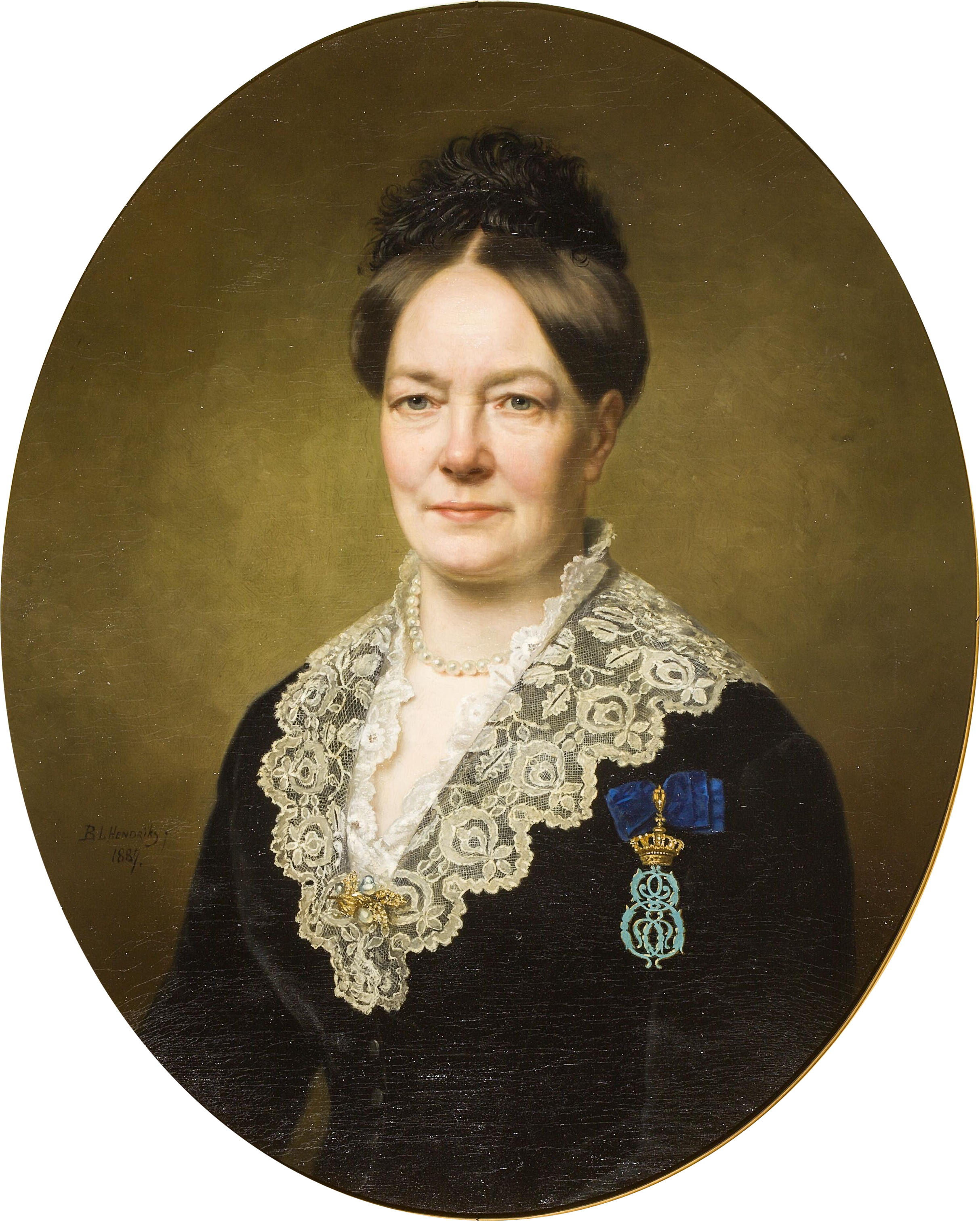 Portret van Sophia barones Schimmelpenninck van der Oye (1887) door B.L. Hendriks